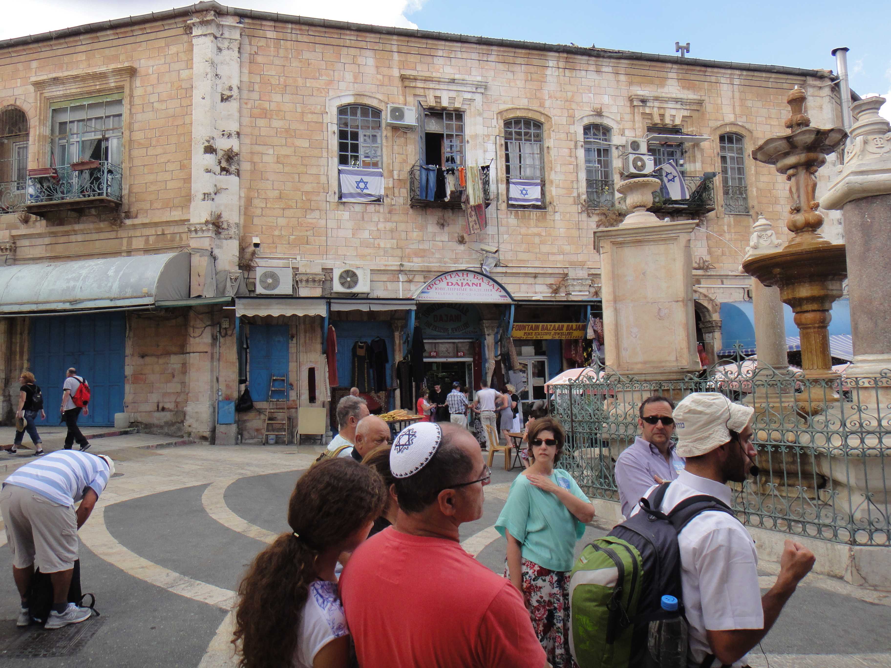 נאות דוד